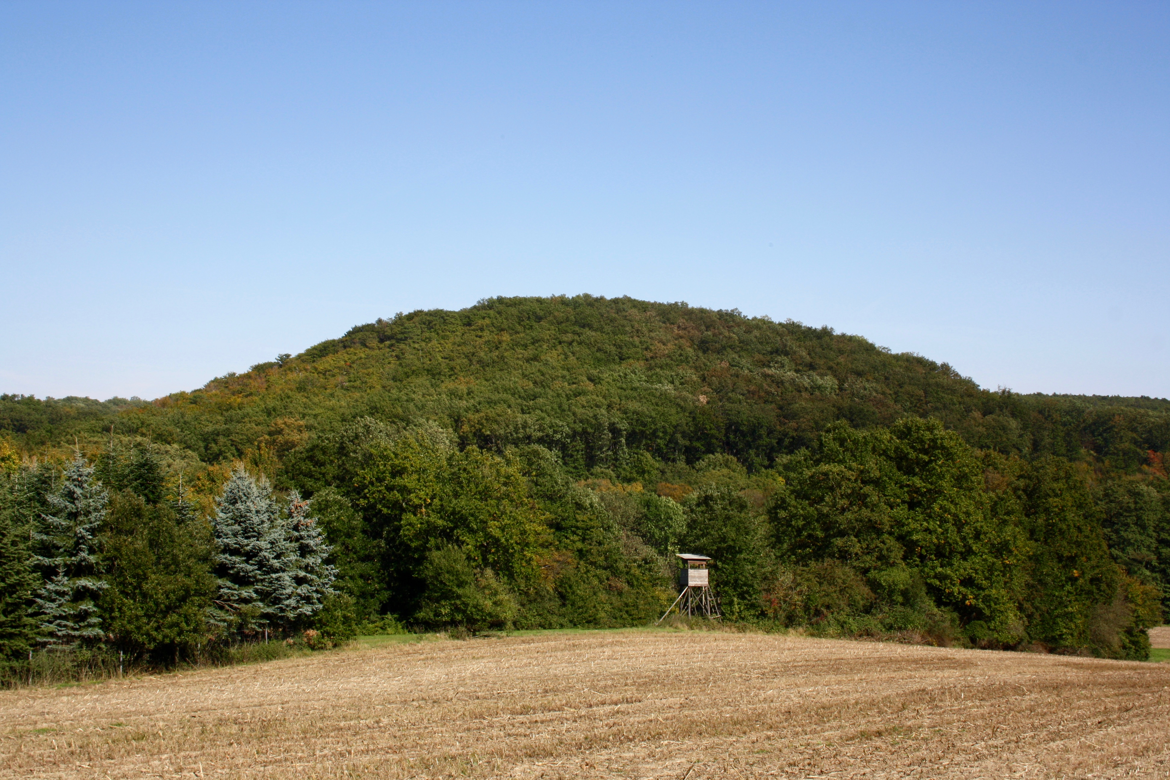 Blick vom Tschogel südlich des Kaiserzipfs auf den Fasslberg in Wien.